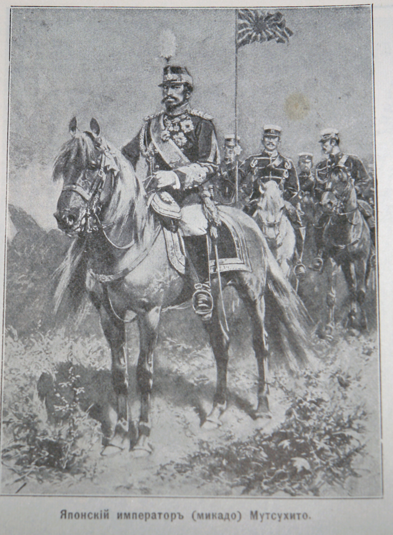 фотография императора Муцухито (Мейдзи). Из журнала Нива за 1904г.